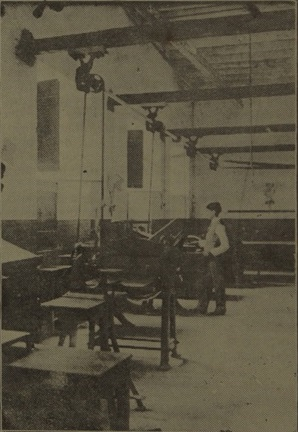 Oficina de Tipografia e Encadernação da Escola de Aprendizes Artífices do Ceará